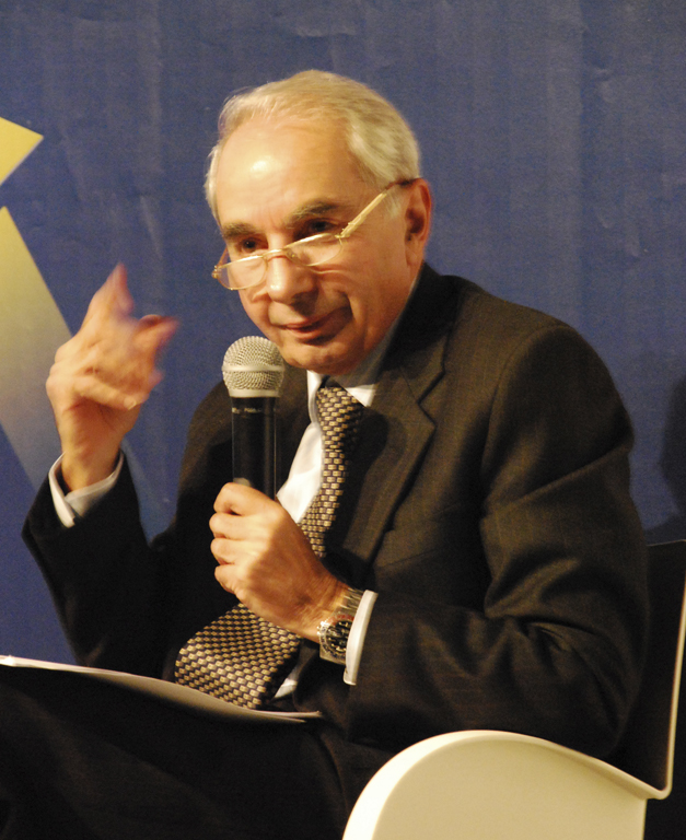 Giuliano Amato, Italian politician. Festival della Creatività 2009, Florence, Italy.